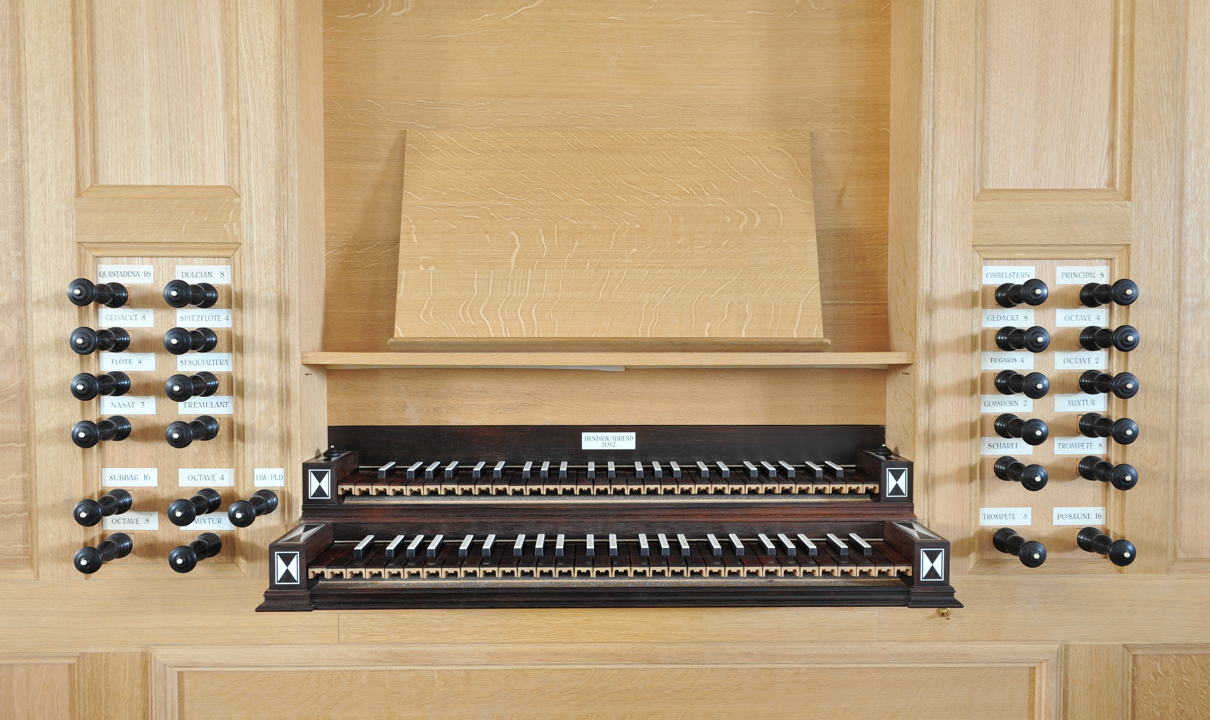 Spieltisch der Ahrend-Orgel der Zionskirche in Worpswede, Niedersachsen